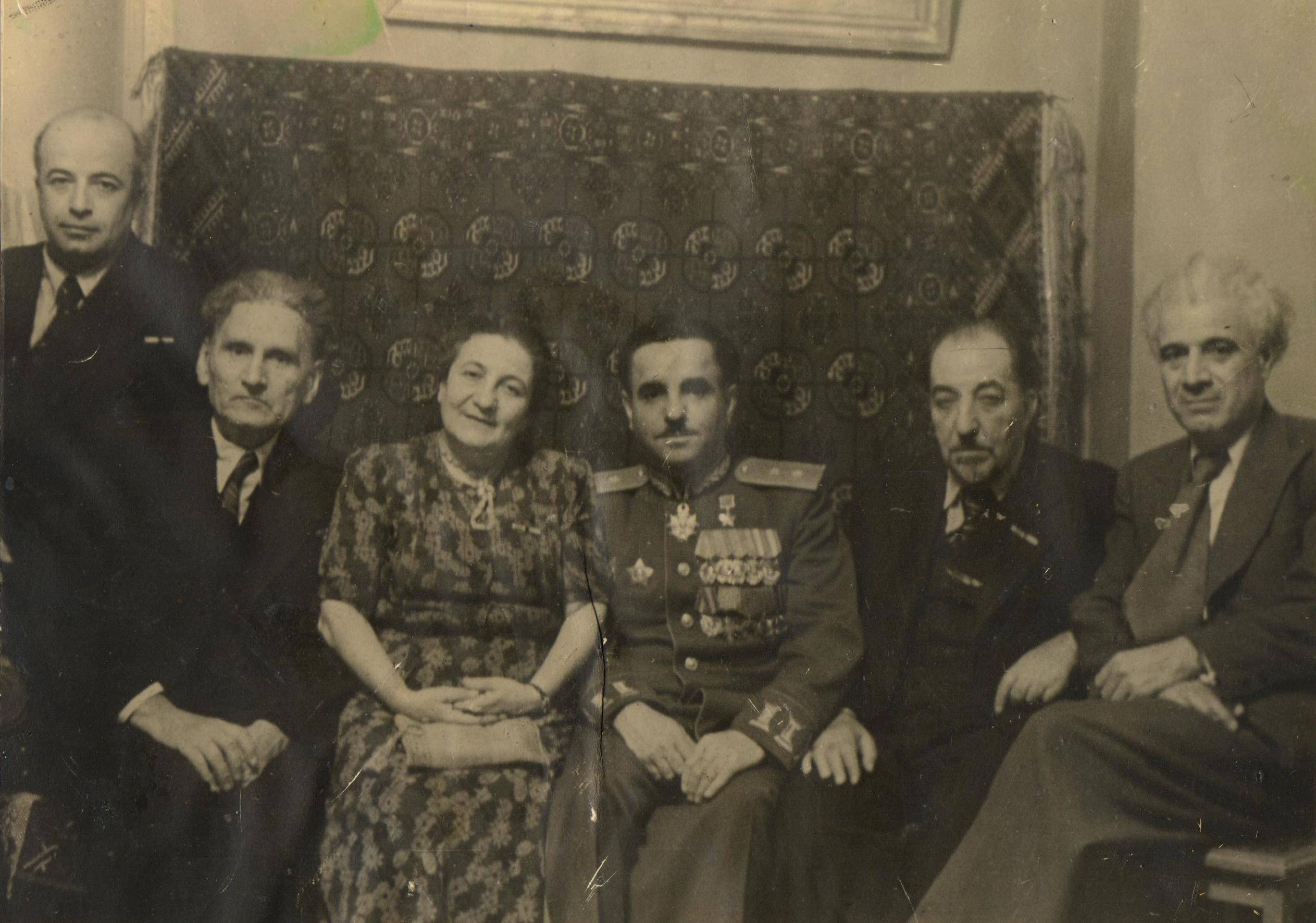 1945թ. Արա Սարգսյան, Մարտիրոս Սարյան, Հայկանուշ Դանիելյան, Ս. Մարտիրոսյան, Ավետիք Իսահակյան, Վաղարշ Վաղարշյան